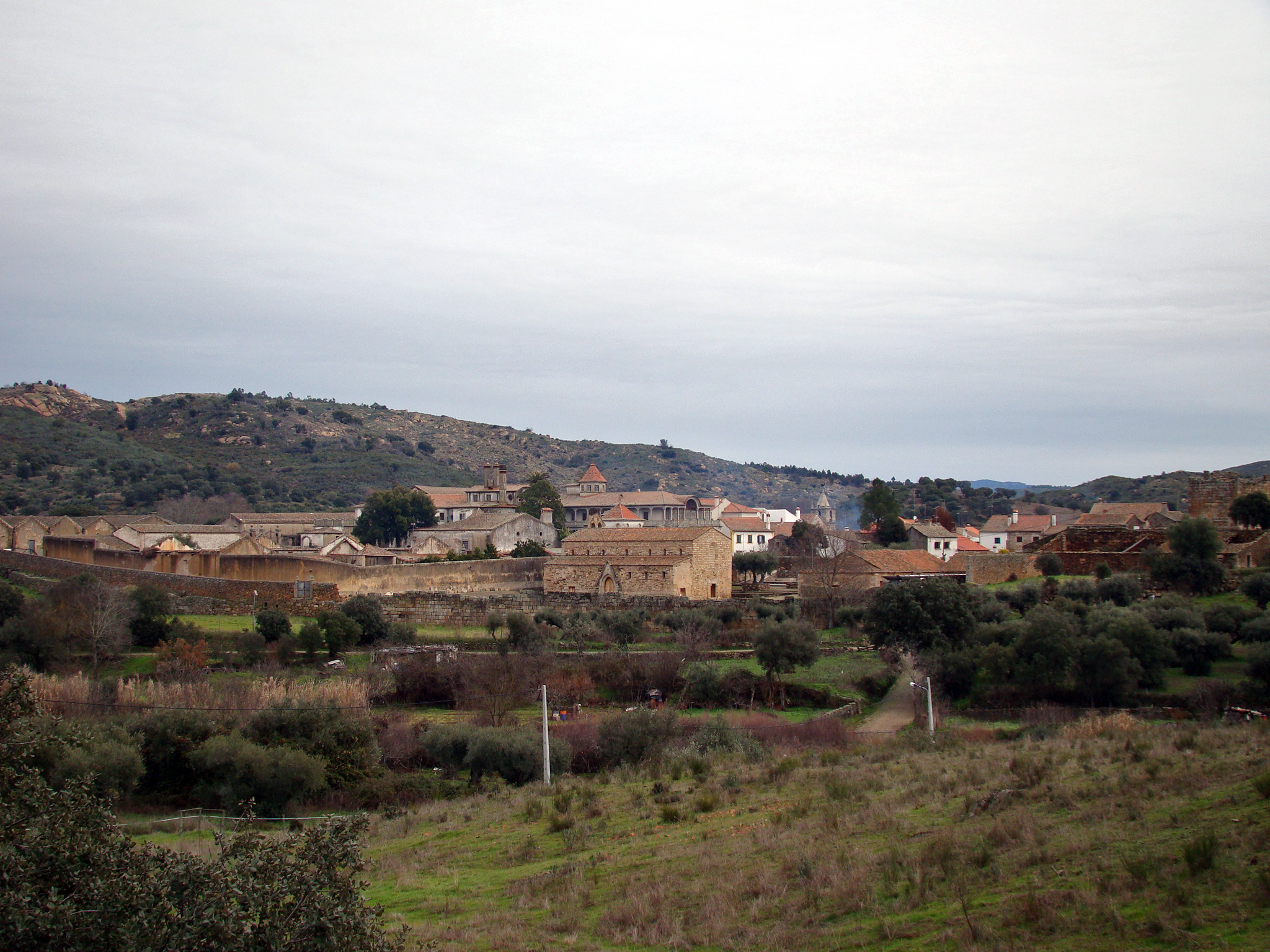 idanha a nova This monument is classified as Monumento Nacional. This file was uploaded for Wiki Loves Monuments in Portugal with the unique identifier 70554.